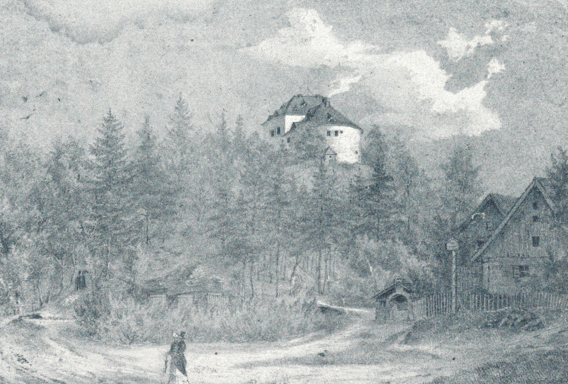 Schloss Hofeck, Zeichnung von Georg Könitzer